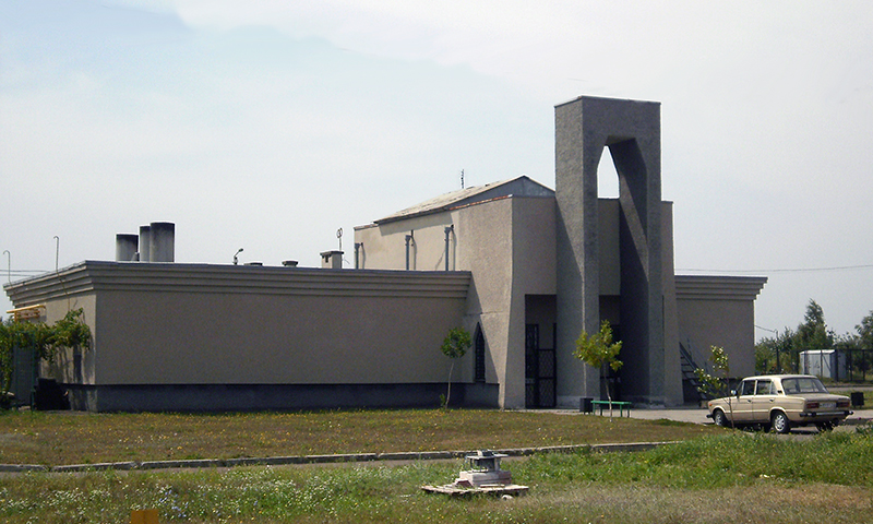 на Таировском кладбище